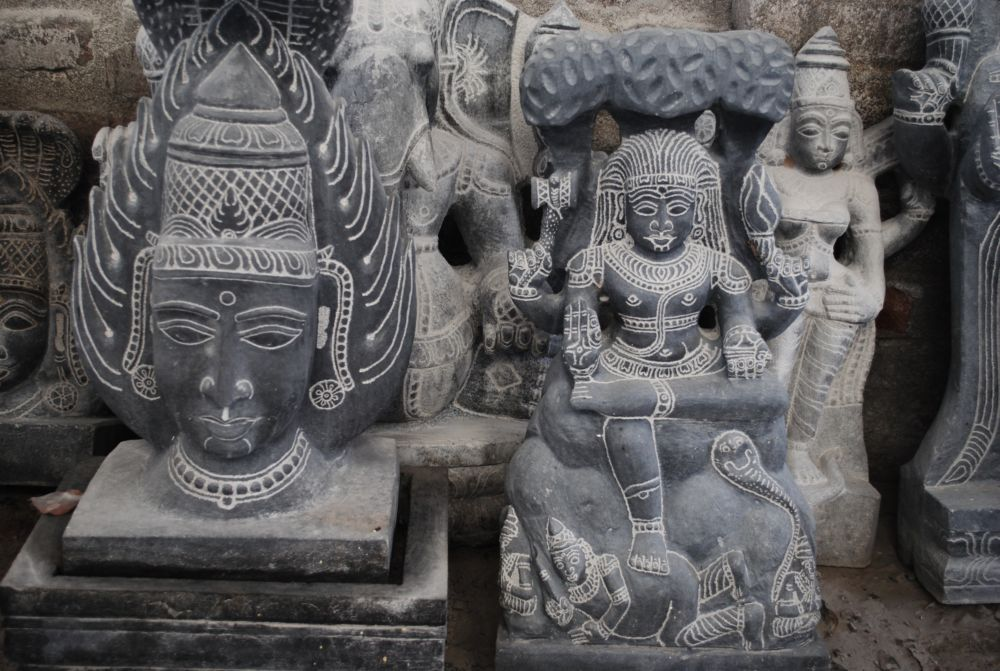 மொடையூர் சிற்பங்கள்